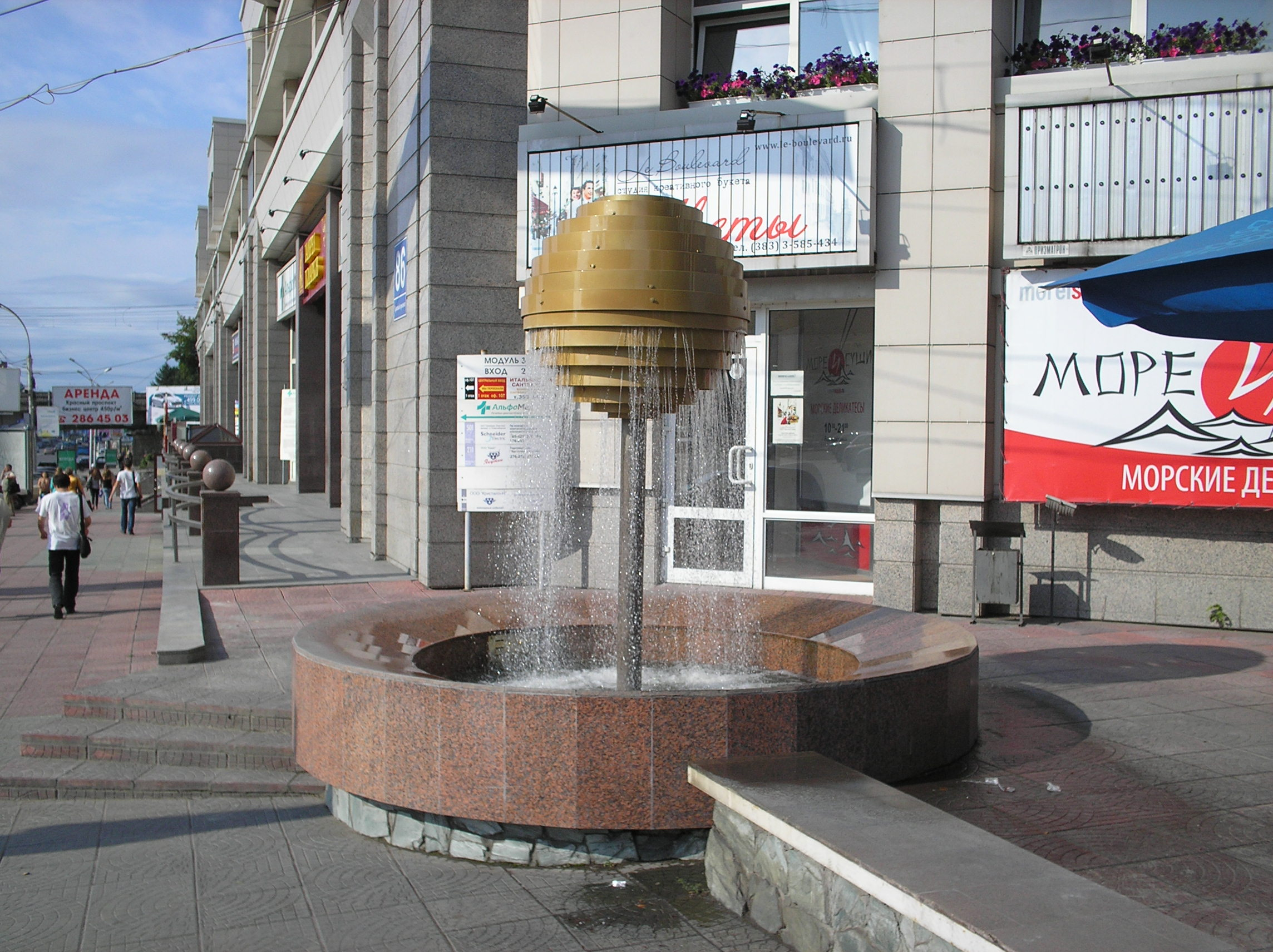 Фонтан в Новосибирске на пересечении Красного проспекта и улицы Писарева